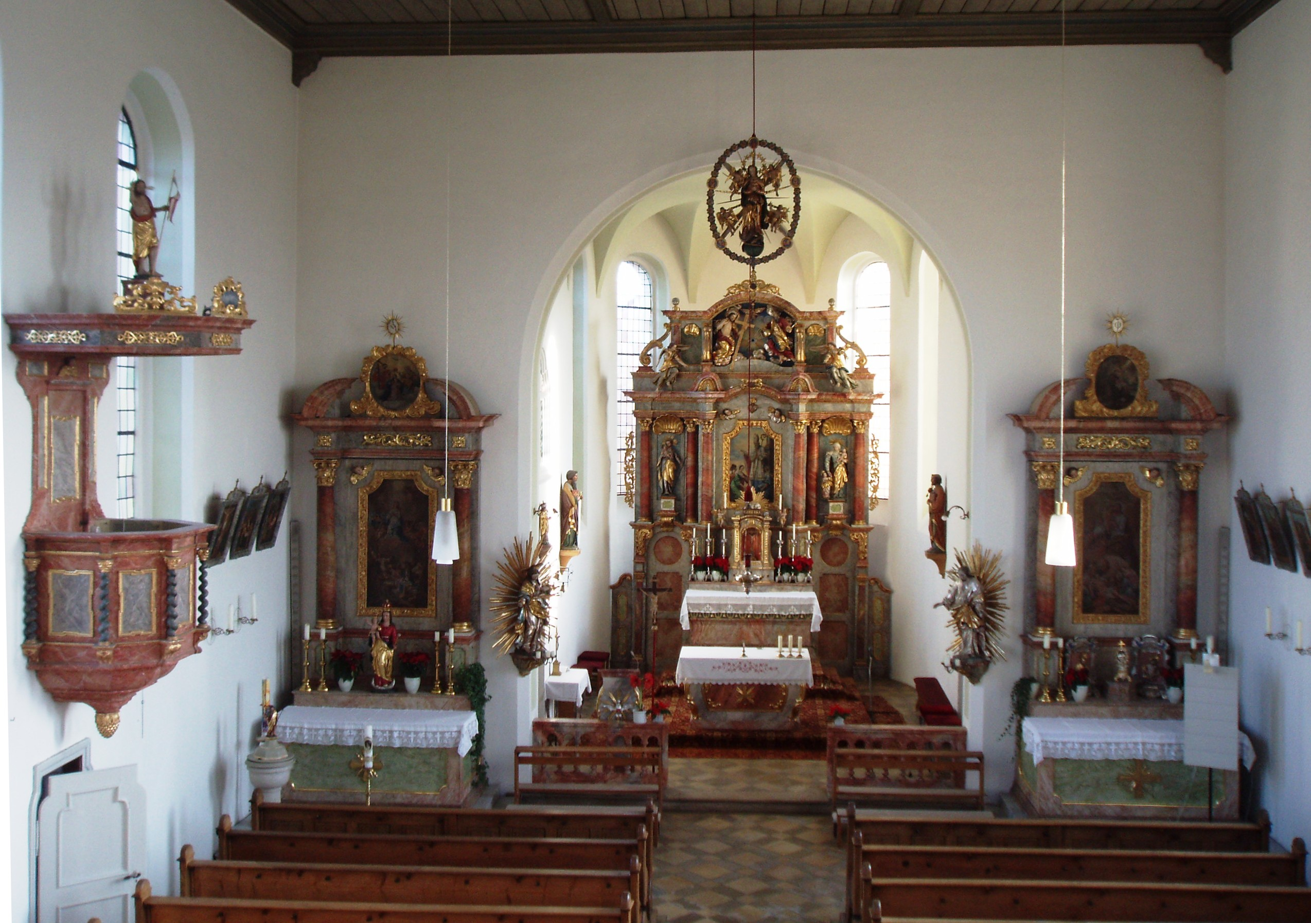 Hofstetten im Landkreis Eichstätt, Inneres der Pfarrkirche This is a photograph of an architectural monument.